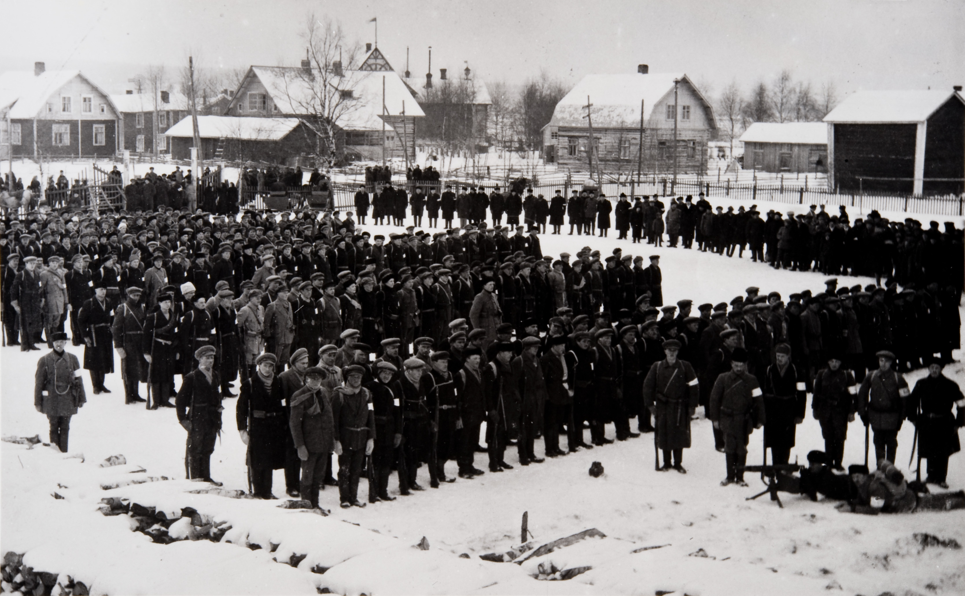 Lapuan miehistä muodostettu valkoisten joukko-osasto lähdössä sisällissotaan kevät-talvella 1918.